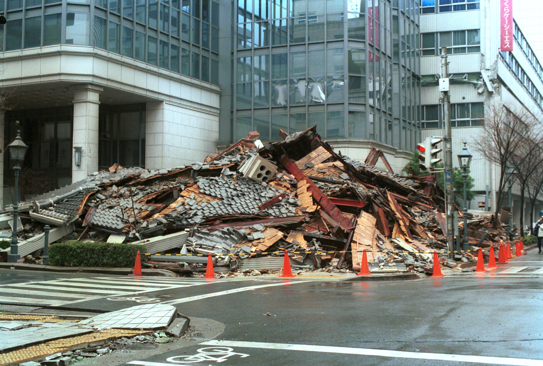 阪神淡路大震災で全壊した旧居留地十五番館